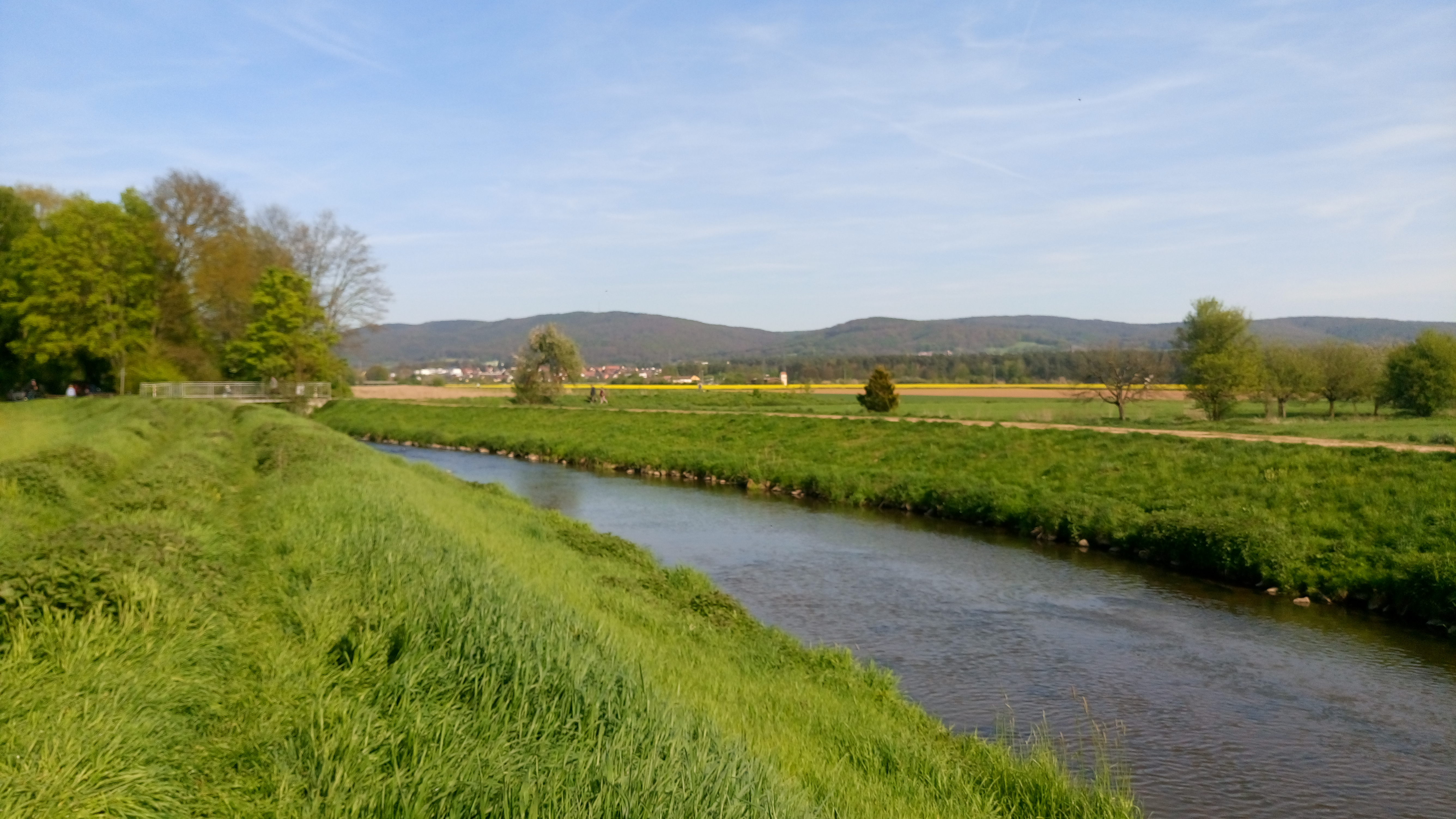 Die Kahl im Prischoß bei Alzenau, Bayern